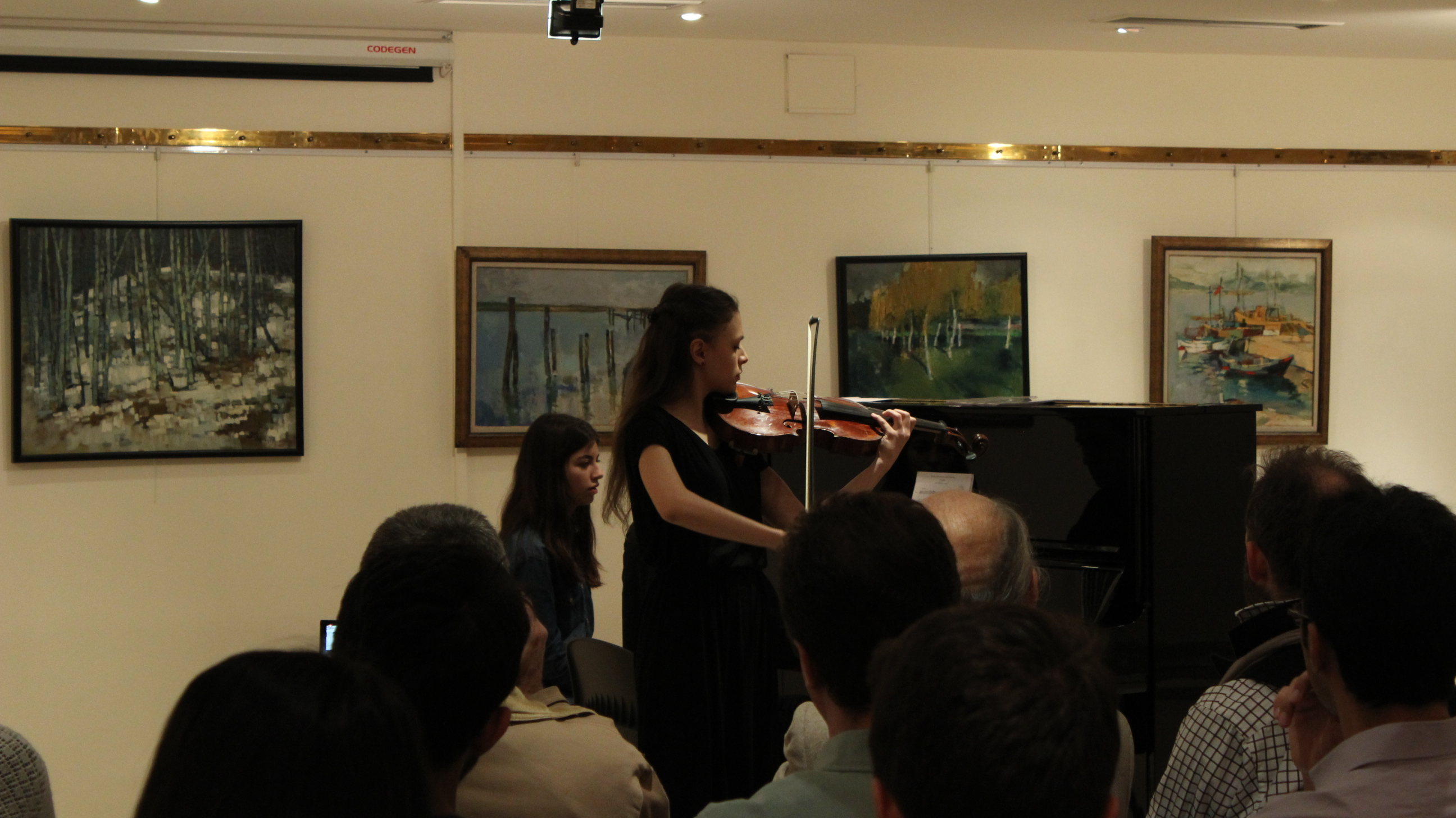 Bilkent Üniversitesi Müzik ve Sahne Sanatları Fakültesi öğrencileri'nin kütüphanede verdikleri öğle konserlerinden.